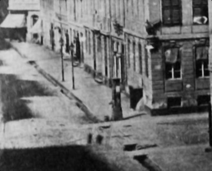 Halffter, Wilhelm: Berlin, alte Leipziger Straße (an der Kurstraße)